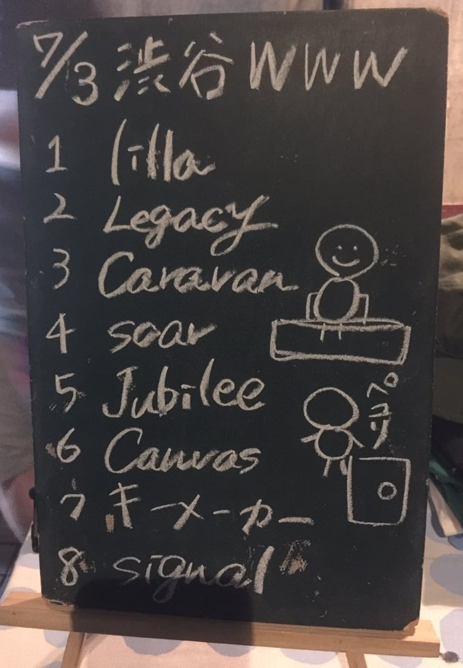 amiinAセトリボード